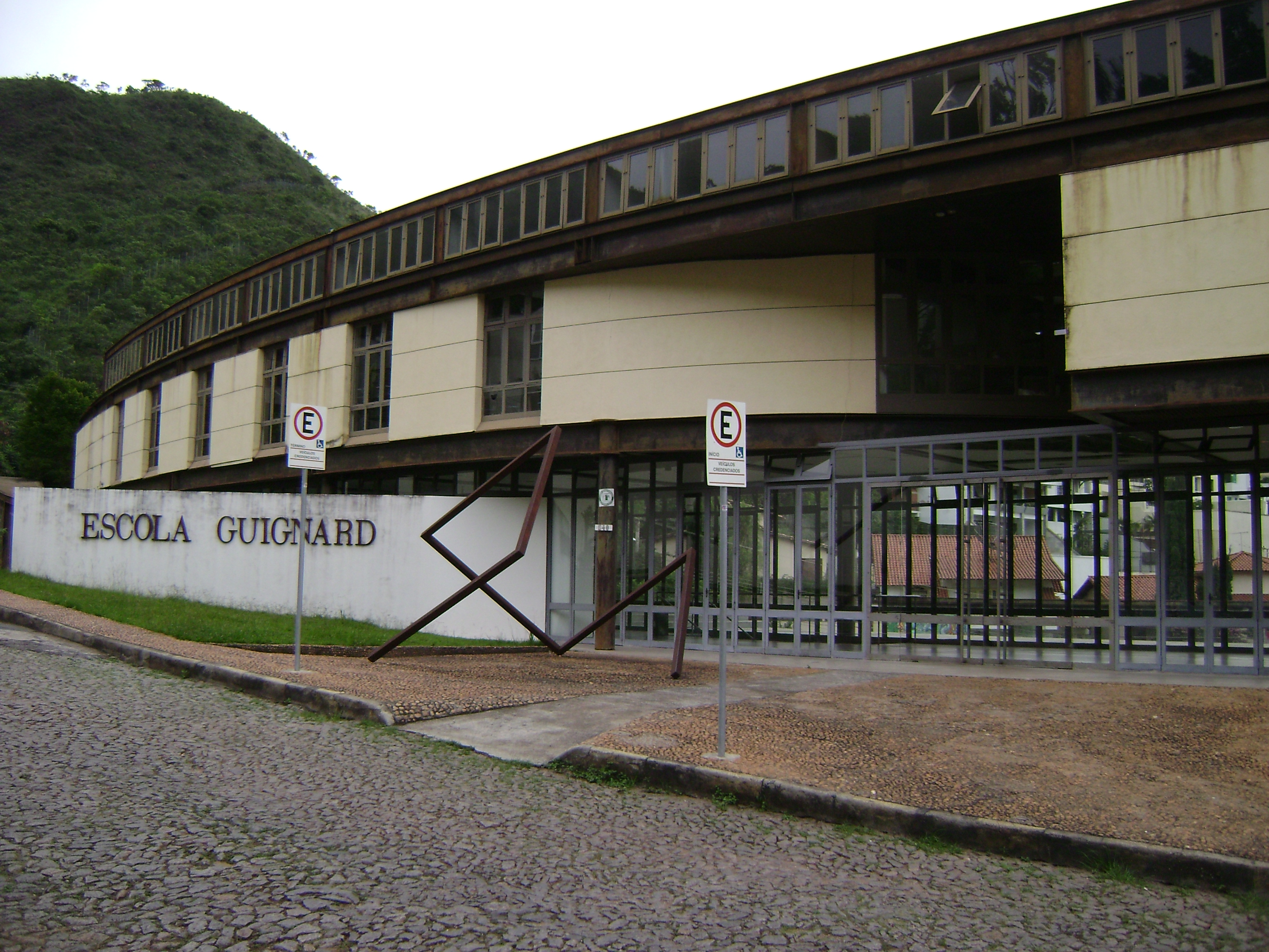 Fachada da Escola Guignard, unidade da Universidade do Estado de Minas Gerais, em Belo Horizonte, Brasil.